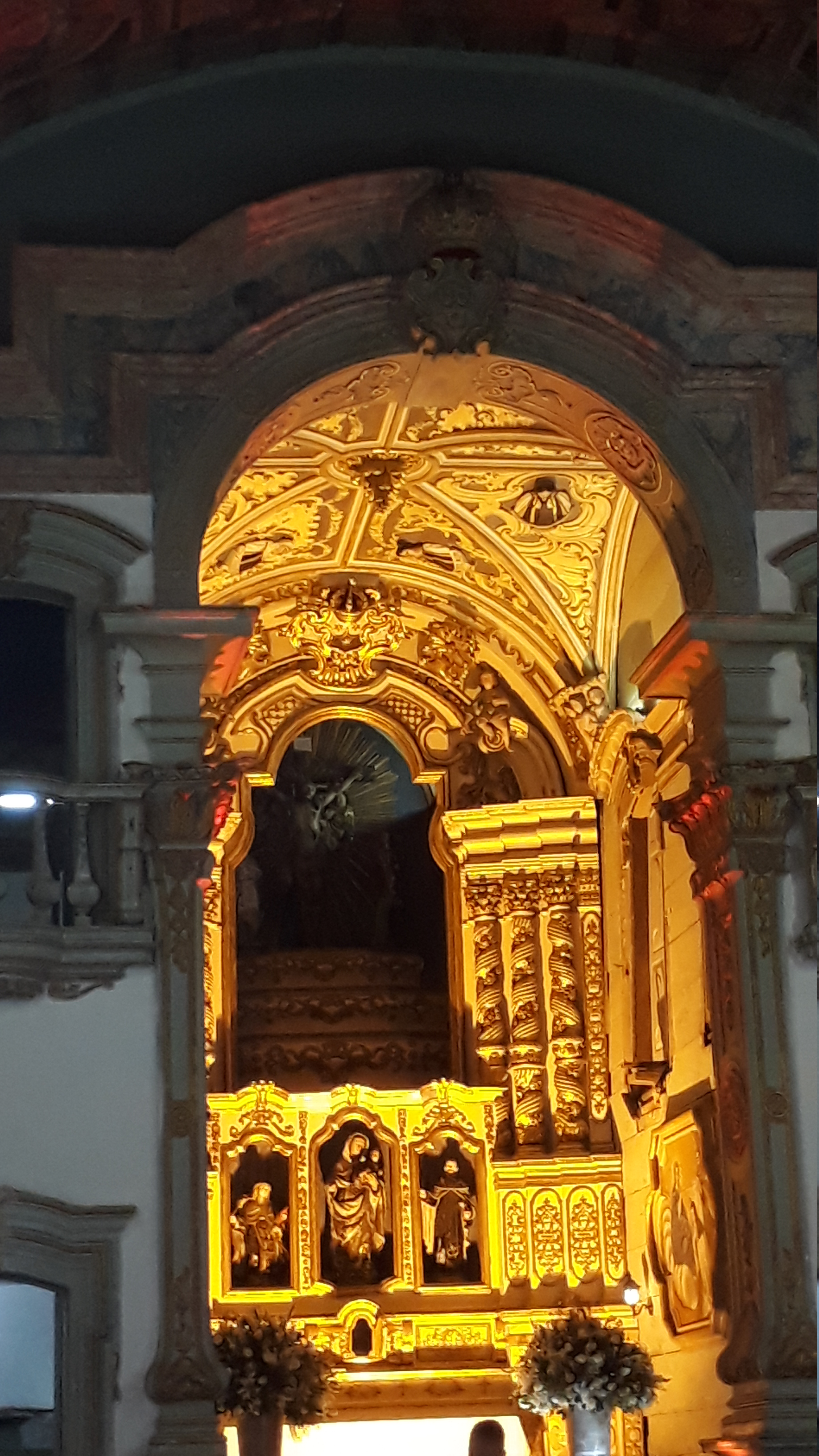 Capela Dourada da Igreja de Santa Teresa de Jesus da Ordem Terceira do Carmo, Anexo da Igreja Nossa Senhora do Carmo em João Pessoa, Paraíba.